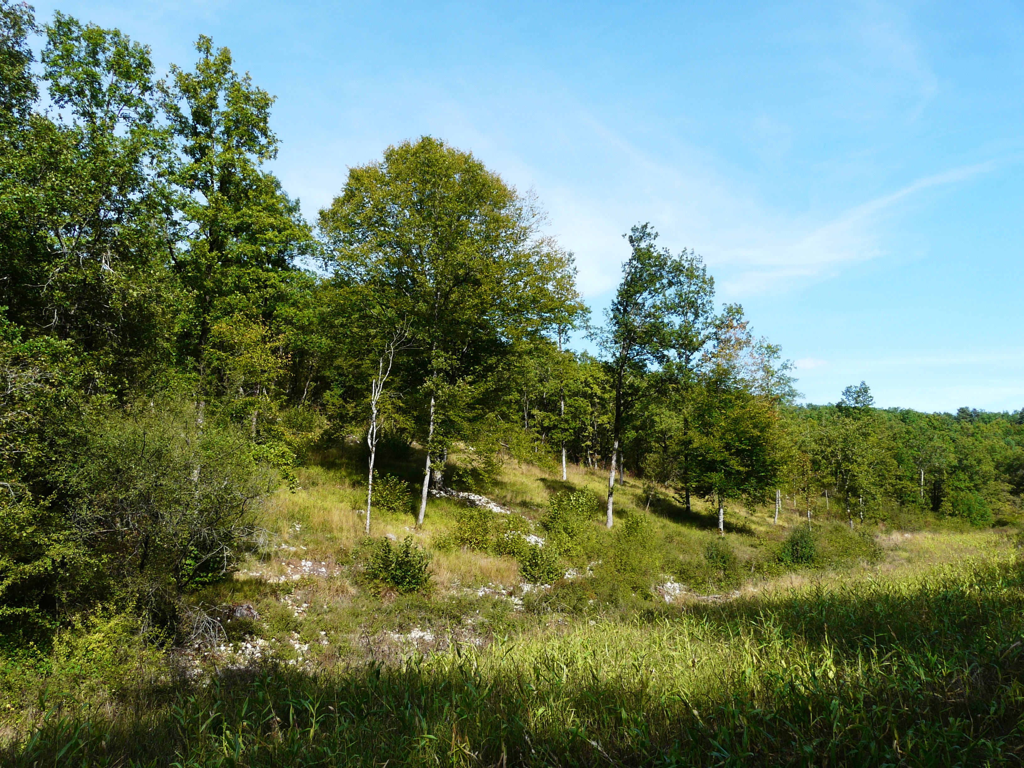 Le causse de Cubjac, à l'est du cimetière de Saint-Vincent-sur-l'Isle, Dordogne, France.